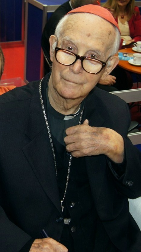 Biskup Stanisław Nagy.